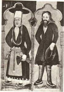 Традыцыйны касцюм ісландаў, фрагмент роспісу